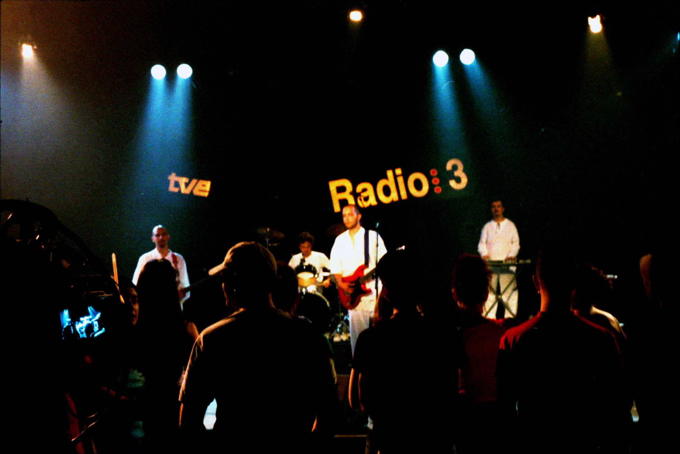 Directo de CULTO OCULTO en los Conciertos de Radio 3. Madrid, España, 2003.